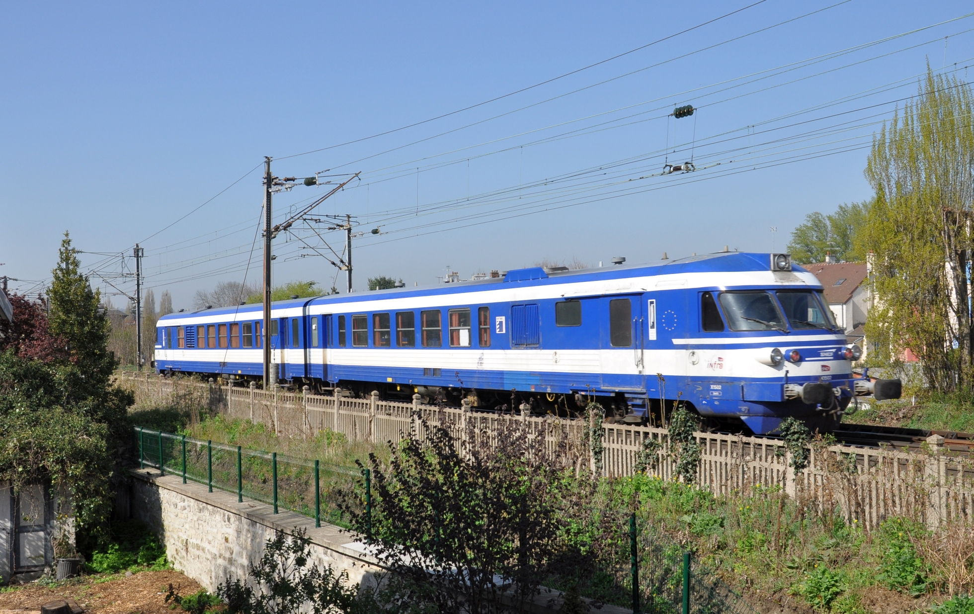 L'ETG Astrée passe Poissy (Yvelines) le 02 avril 2012